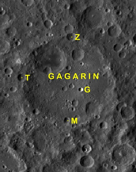 Cráter lunar Gagarin. Cráteres satélite. (Imagen LRO)